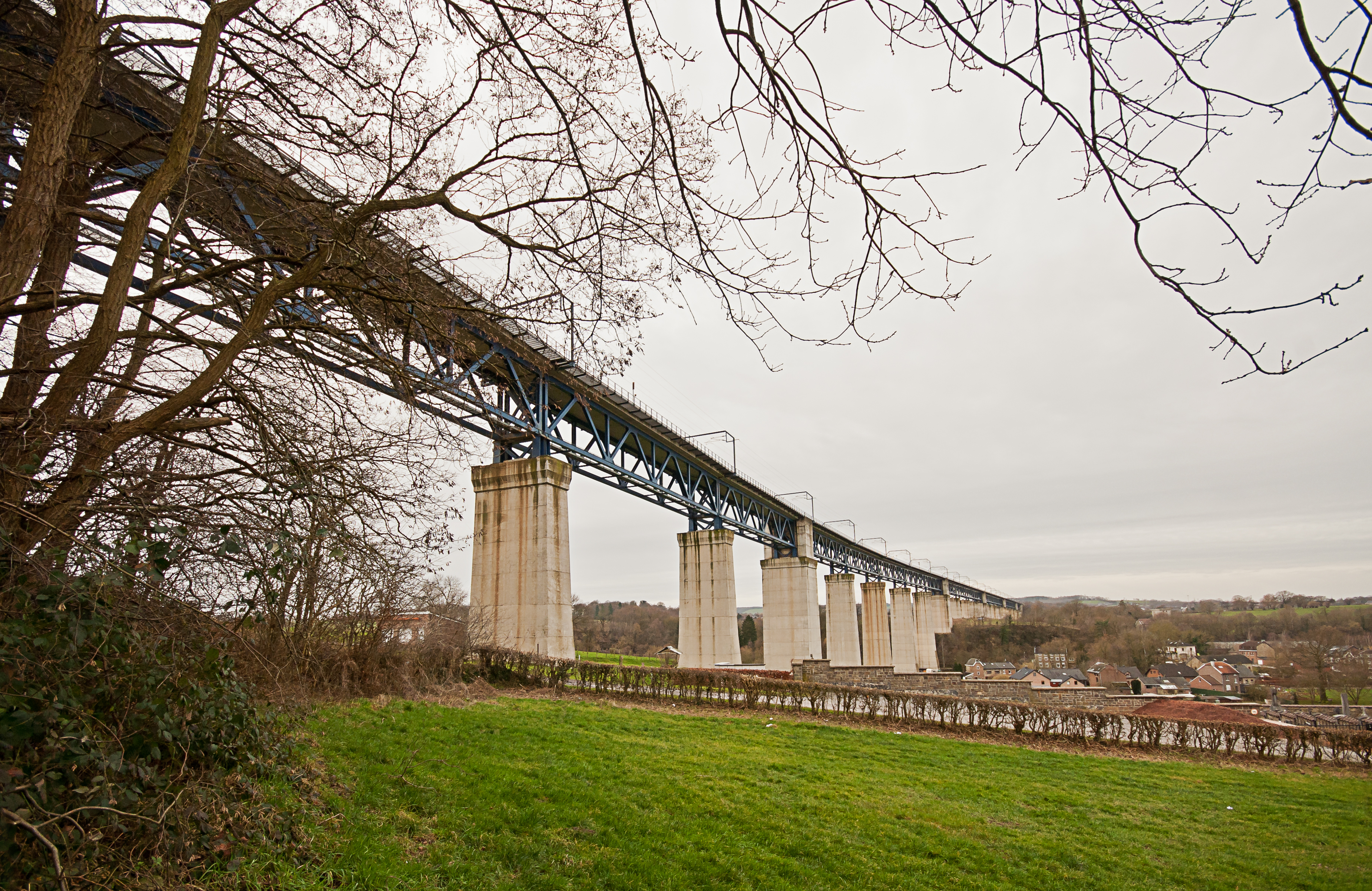 Der Göhltalviadukt, gesehen auf der Innenseite des Bogens über den Moresneter Friedhof